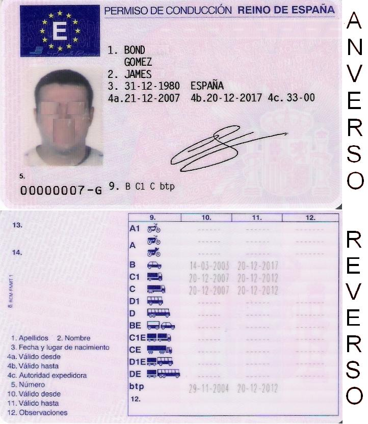 Nuevo permiso de conducir plastificado. Datos personales modificados.